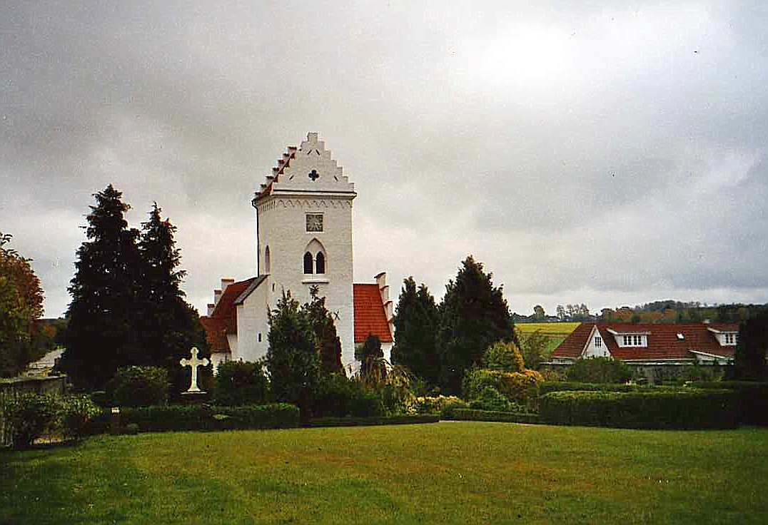 Spjellerup Kirke, St. Spjellerup, Faxe Kommune